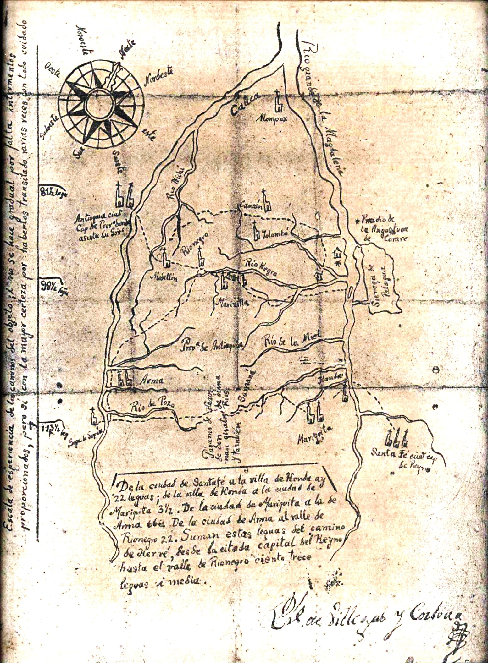 Primer mapa de la Provincia de Antioquia, dibujado por don Felipe de Villegas y Córdoba en 1775